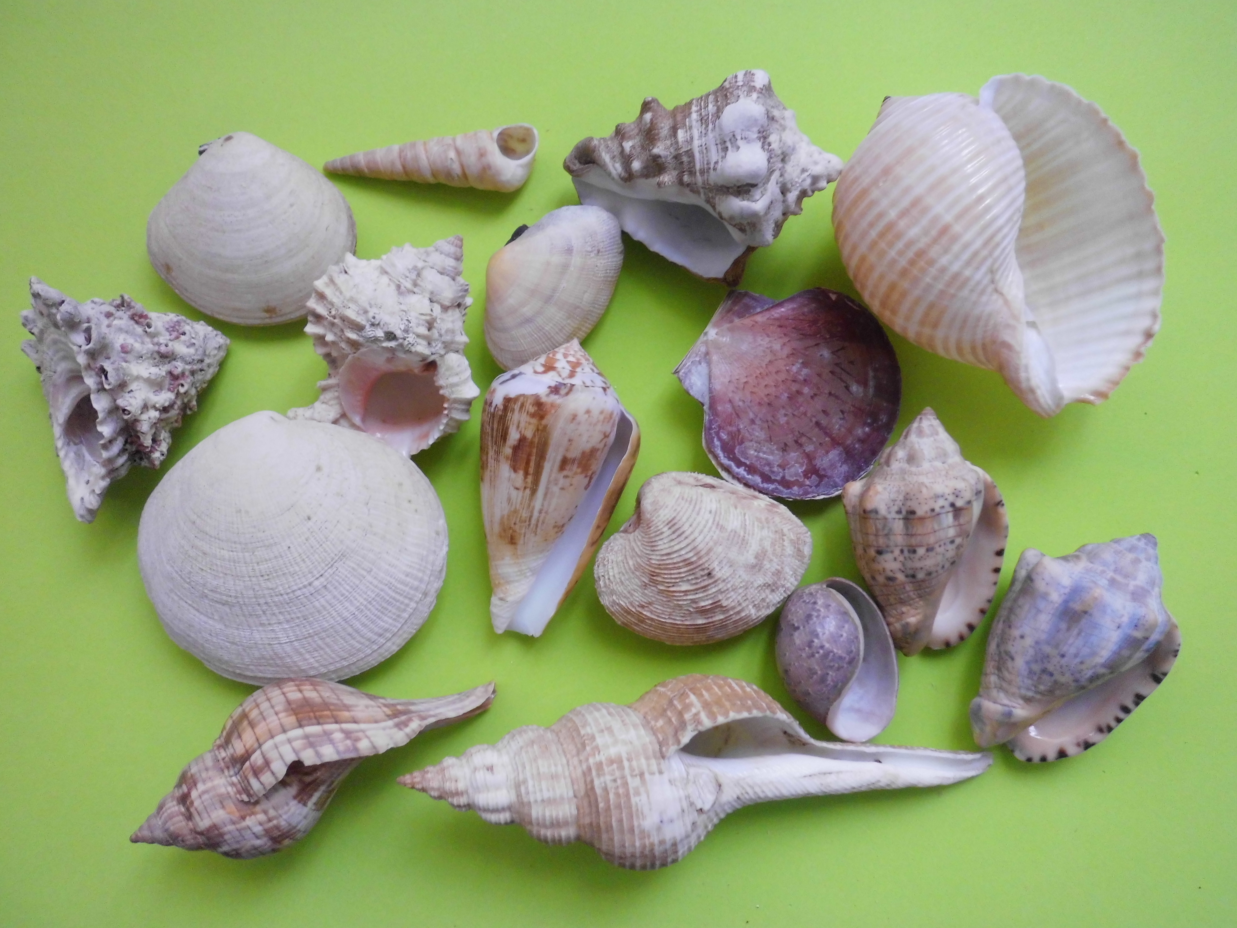 Moluscos de Venezuela en la imagen se observan las siguientes especies: Gastropodos Conus ermineus Born, 1778 Vasum muricatum (Born, 1778) Voluta musica Linnaeus, 1758 Phyllonotus pomum (Gmelin, 1791) Turritella variegata (Linnaeus, 1758) Bulla striata Bruguière, 1792 Fusinus closter (Philippi, 1850) Tonna galea (Linnaeus, 1758) Fasciolaria tulipa (Linnaeus, 1758) Astraea caelata (Gmelin, 1791) Bivalvos Asaphis deflorata (Linnaeus, 1758) Arcopagia fausta (Pulteney, 1799) Euvola laurenti (Gmelin, 1791) Codakia orbicularis (Linnaeus, 1758) Globivenus listeroides (Fischer-Piette & Testud, 1967) Nota: Todas las especies provienen de Isla La Tortuga Dependencias Federales